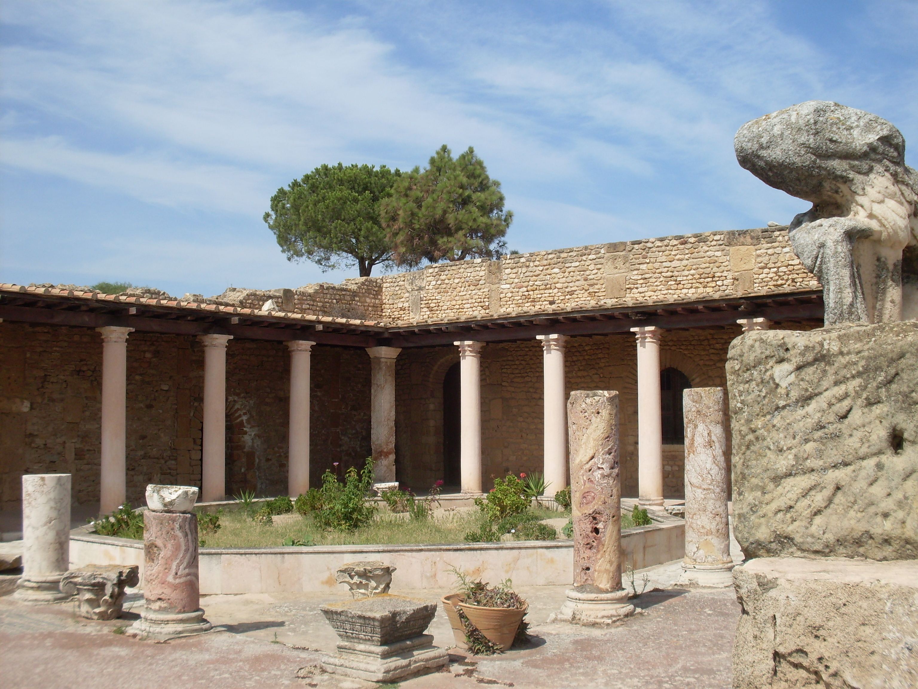 Tunisie, Villa de la volière à Carthage